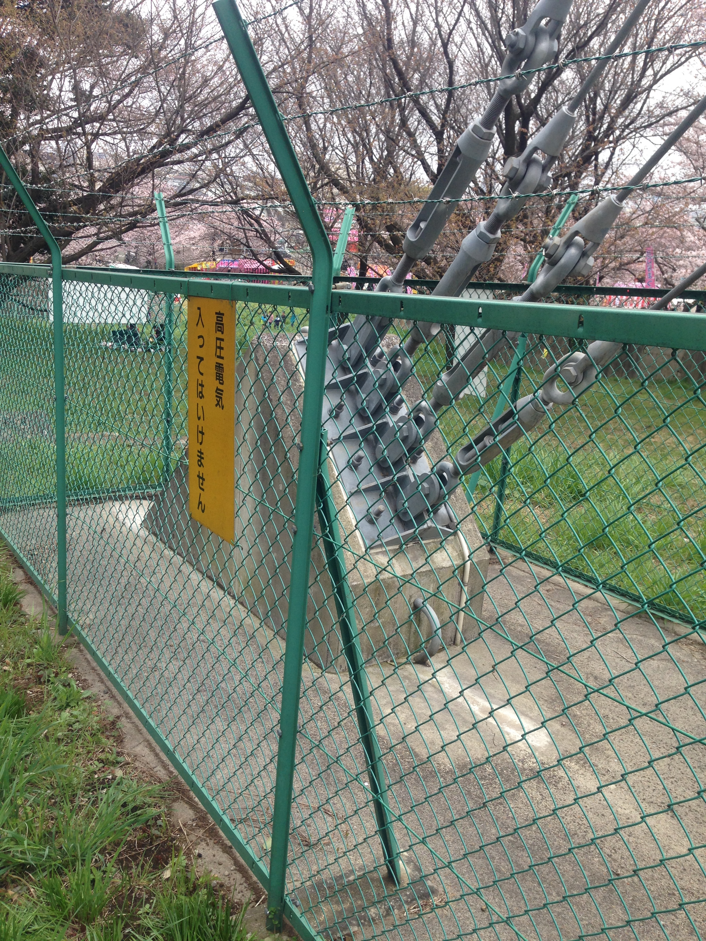 文化放送川口送信所のアンテナ支線アンカー(花見解放時に撮影)